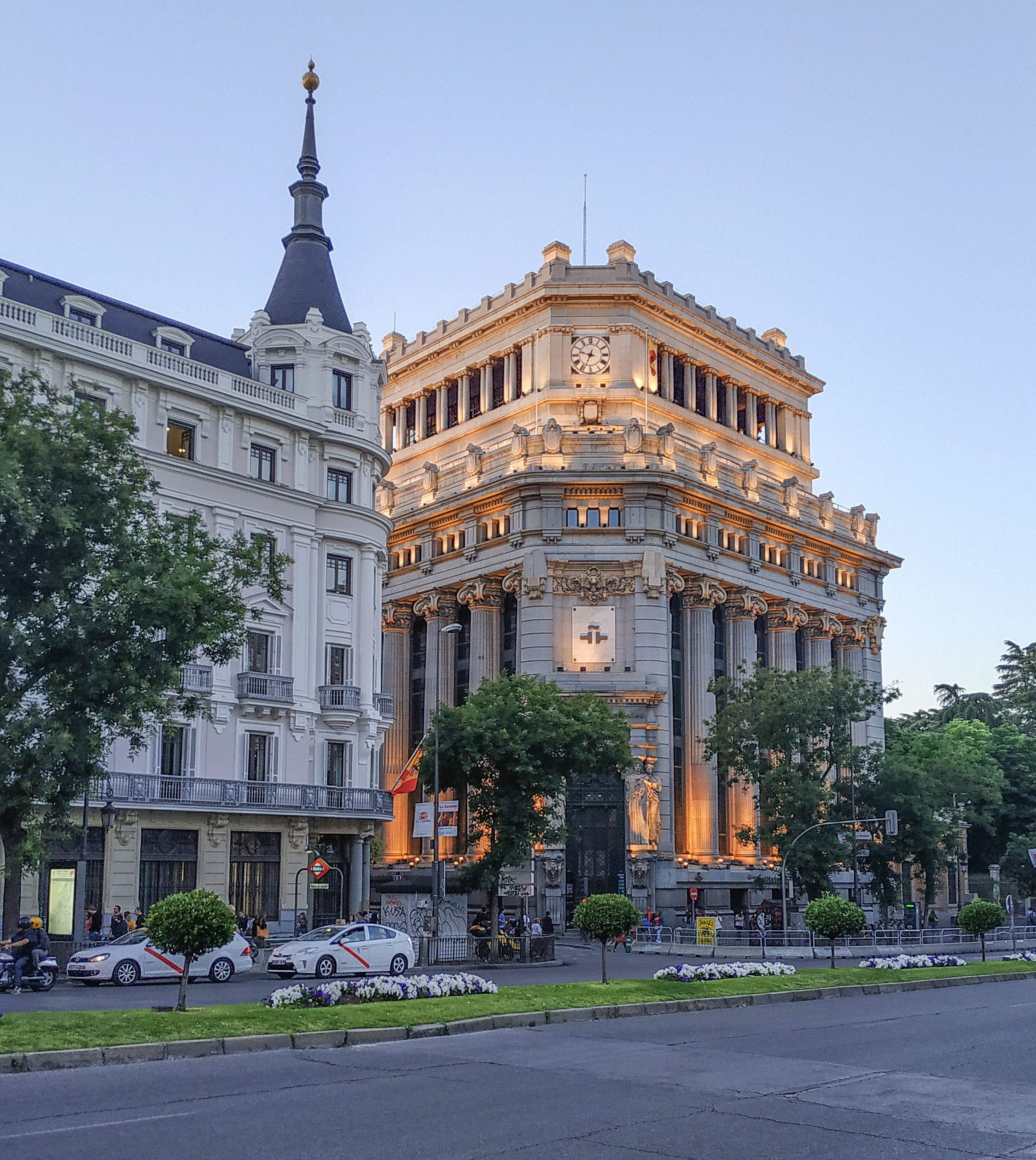 Edificio del Instituto Cervantes, Madrid, España.